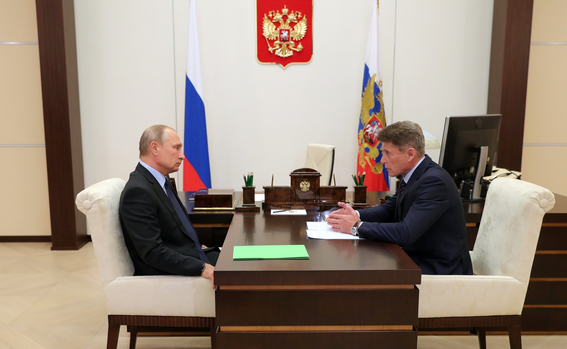 Рабочая встреча Путина с Олегом Кожемяко 26 сентября 2018 года, на которой обсуждалась социально-экономическая ситуация в Сахалинской области. Глава государства также сообщил о решении назначить Олега Кожемяко временно исполняющим обязанности губернатора Приморского края.